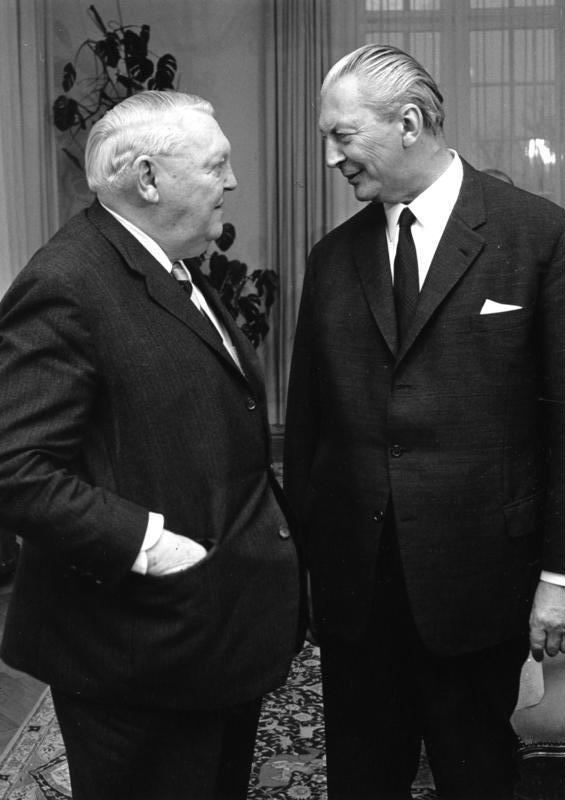 Der Wechsel Erhard / Kiesinger Am 27.10.1966 waren die vier FDP-Bundesminister aus der seit 1965 bestehenden Koalition von CDU/CSU und FDP wegen unterschiedlicher Auffassungen in der Haushaltsfrage zurückgetreten. Die erneuten Koalitionsverhandlungen zwischen CDU/CSU und FDP scheiterten am 25.11.1966, weil eine Einigung über Steuererhöhungen nicht erzielt werden konnte. Am 27.11.1966 einigten sich daraufhin CDU/CSU und SPD auf die Bildung einer "Großen Koalition" mit Kurt Georg Kiesinger, CDU, als Bundeskanzler und Willy Brandt, SPD, als Vizekanzler und Bundesaußenminister. Der amtierende Bundeskanzler, Prof. Dr. Ludwig Erhard, erklärte am 30.11.1966 seinen Rücktritt, und der Deutsche Bundestag bestätigte am 1.12.1966 Kurt Georg Kiesinger mit 340 gegen 109 Stimmen als neuen Bundeskanzler. Im Bild: Als designiereter Kanzlerkandidat der "Großen Koalition" führte Kurt Georg Kiesinger (re.) am 25.11.1966 in Bonn ein Gespräch mit Bundeskanzler Ludwig Erhard